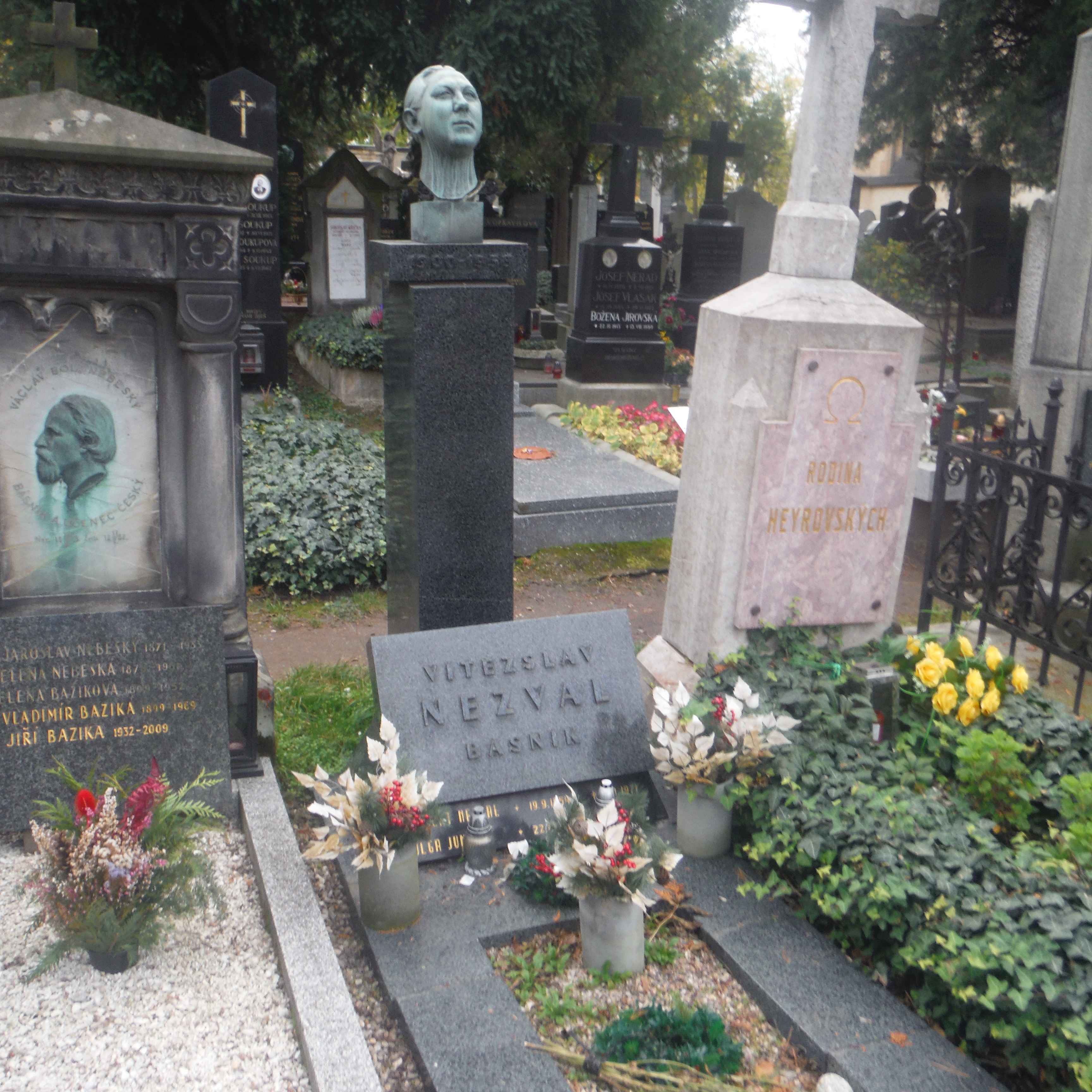 hrob